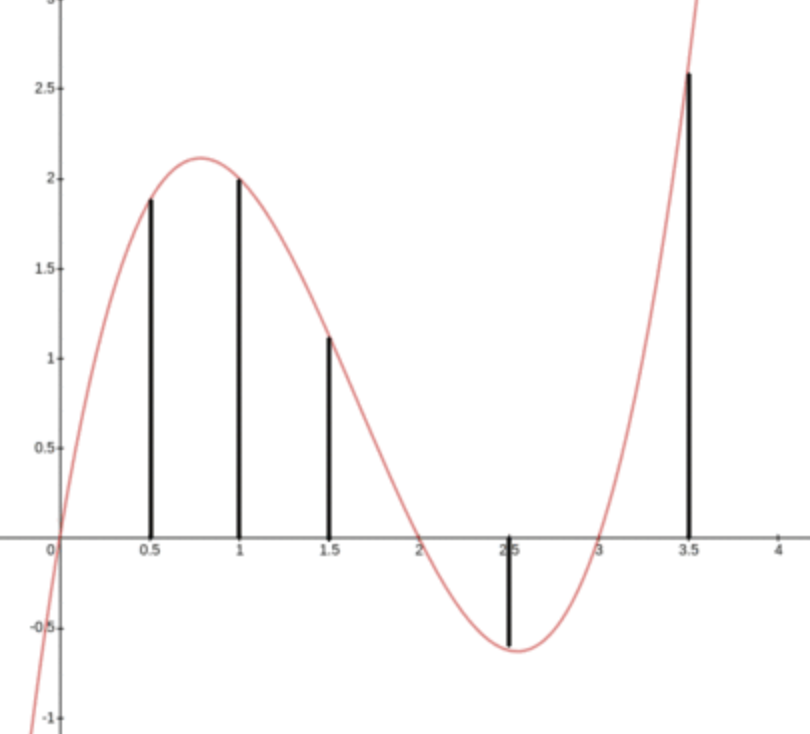 نموداری برای فهم بیشتر قانون سیمپسون سه هشتم